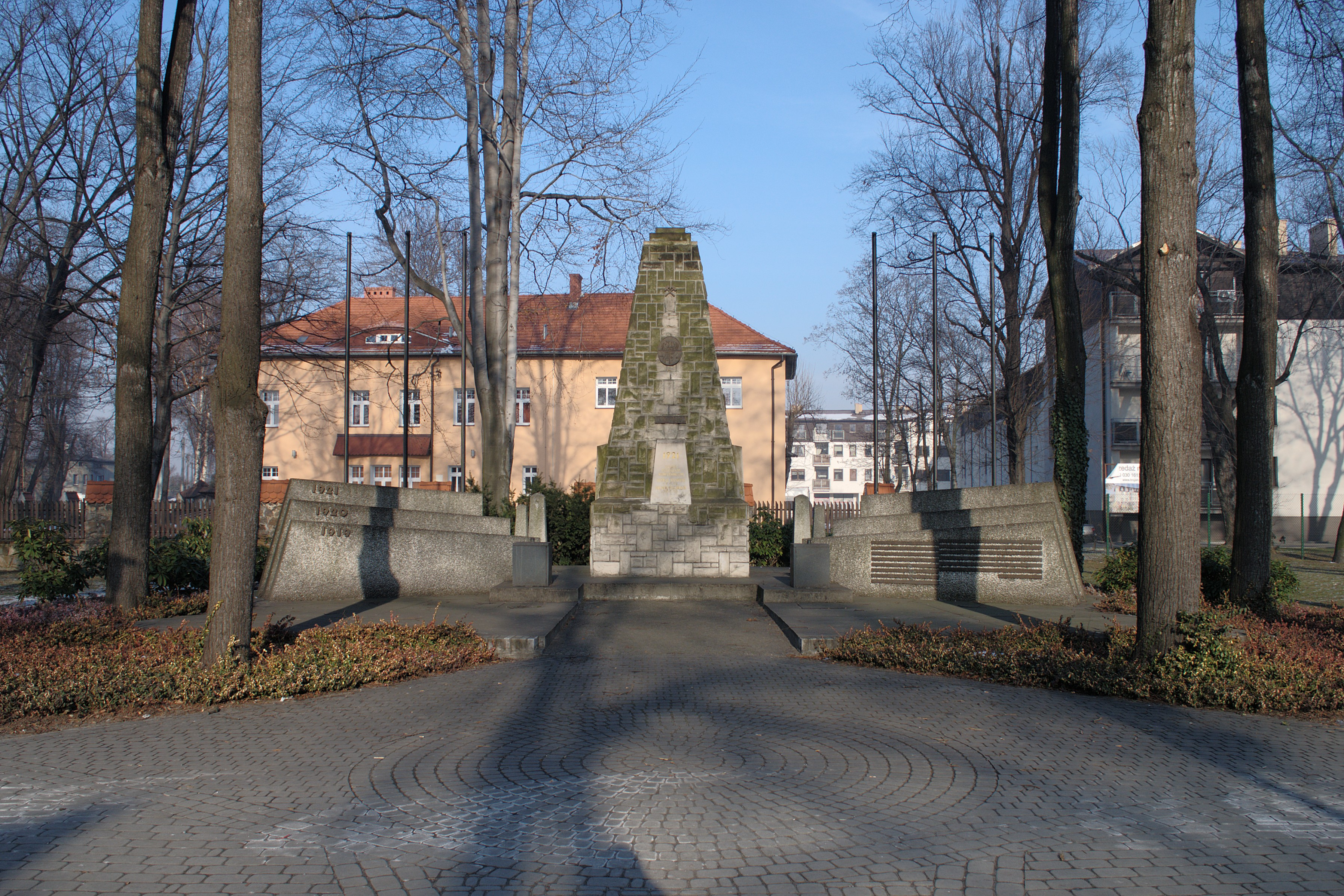 Knurów. Pomnik Powstańców Śląskich.